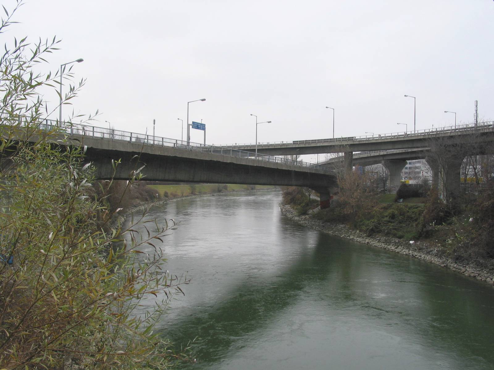 Nußdorfer Brücke, 2006-12-25